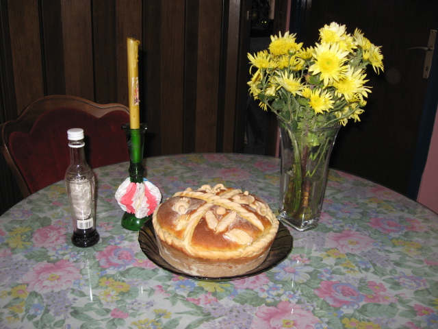 Slavski kolac, sveca, cvece i vino